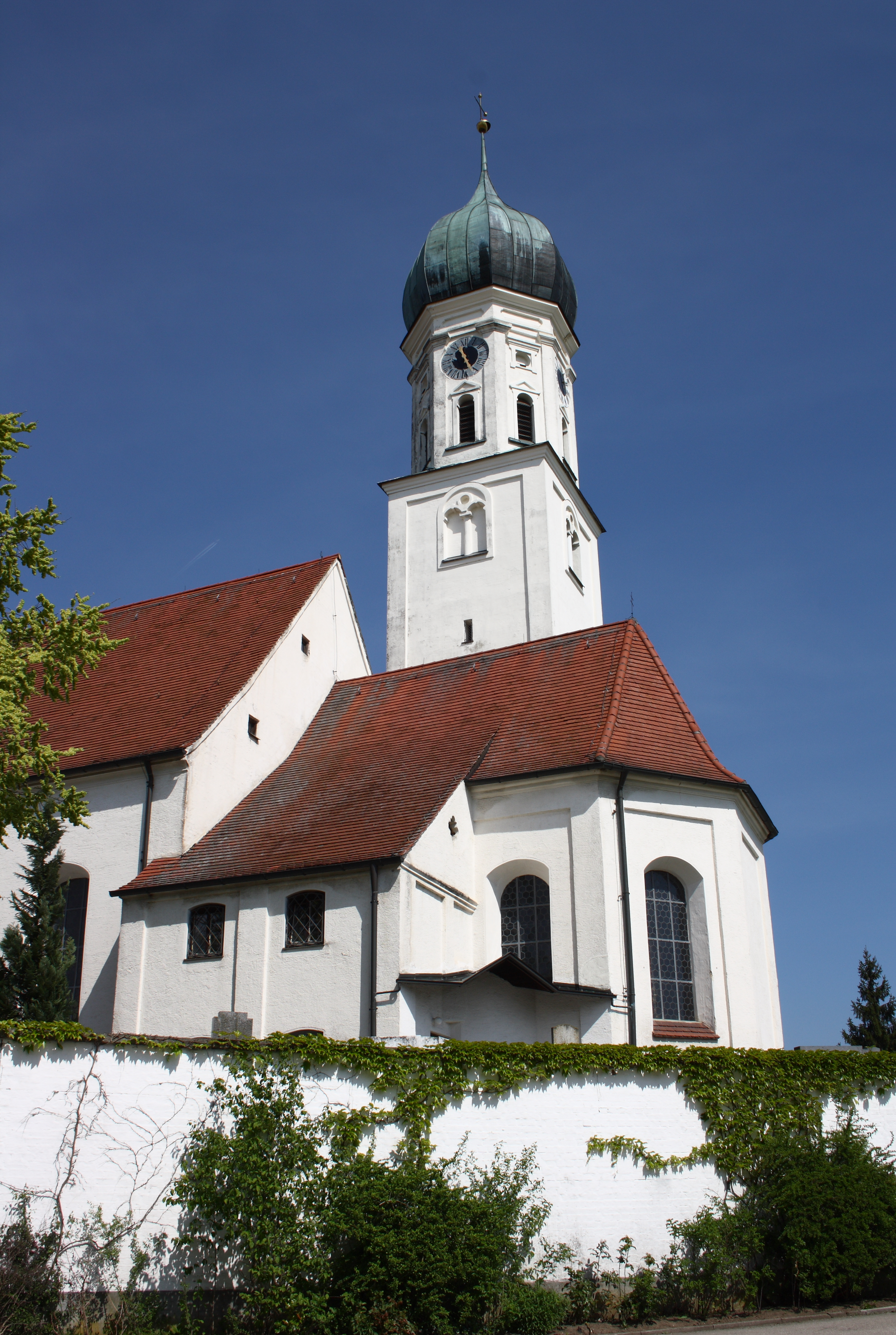 Katholische Pfarr- und Wallfahrtskirche Mariä Heimsuchung in Gottmannshofen, einem Stadtteil von Wertingen im Landkreis Dillingen an der Donau (Bayern), Apsis und Turm mit Zwiebelhaube